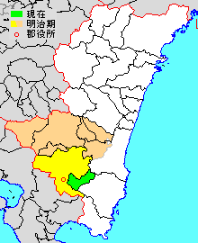 宮崎県北諸県郡の範囲